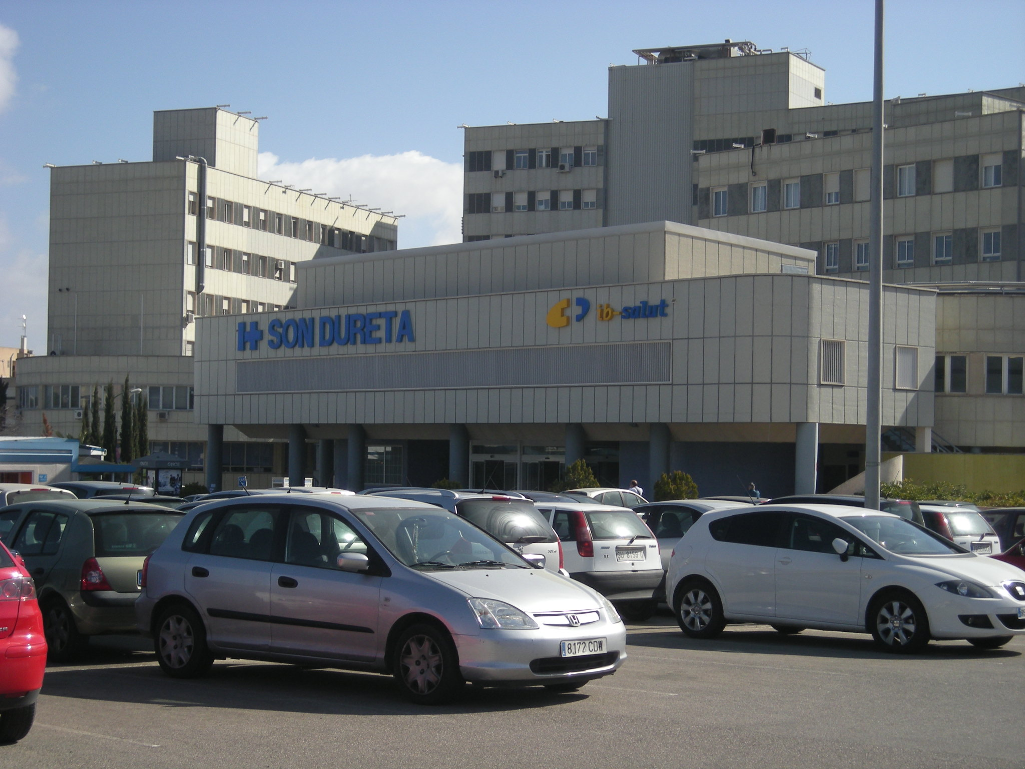 Hospital de Son Dureta. Palma. Mallorca